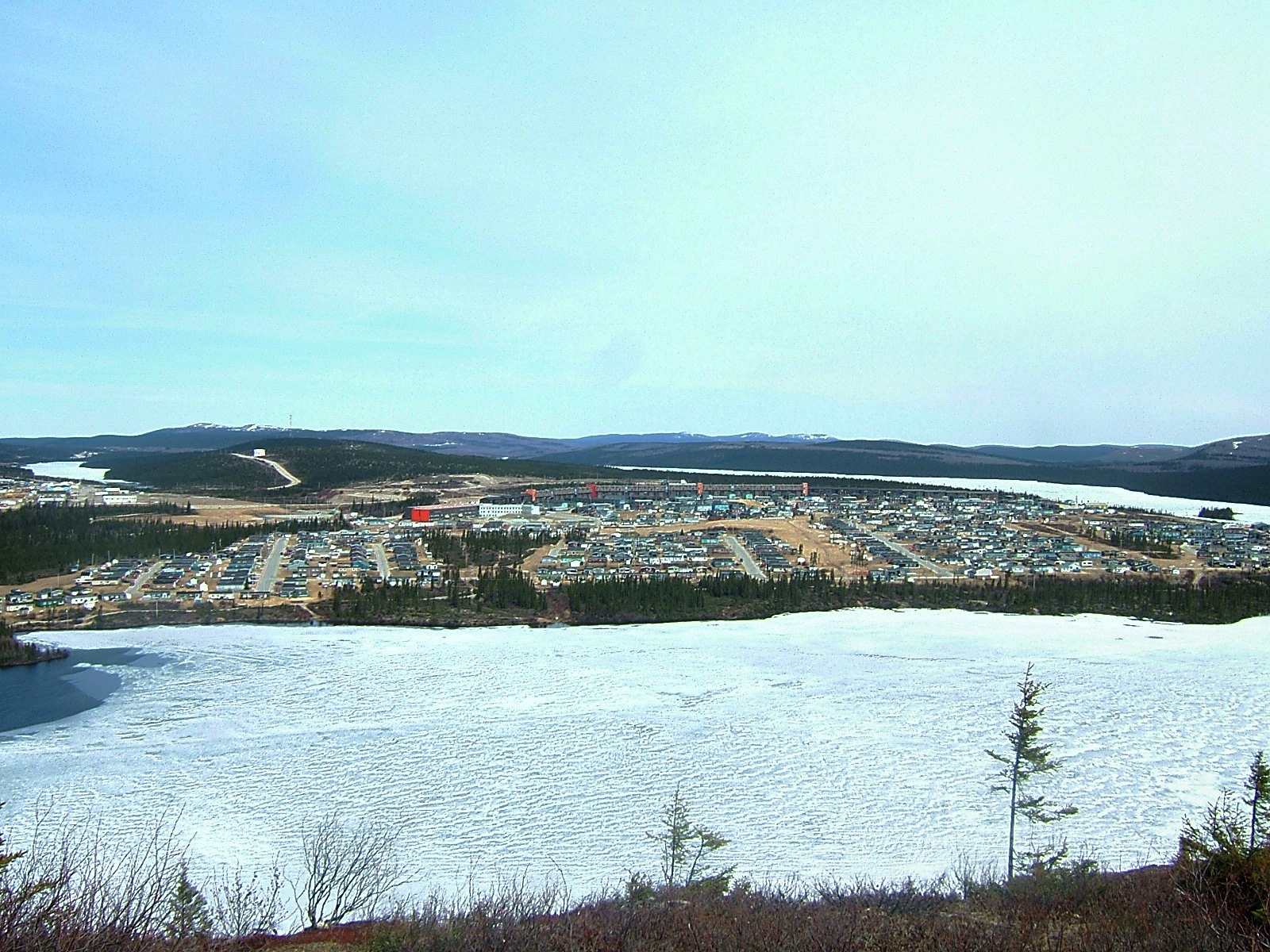 Photo de Fermont prise du Mont Daviault